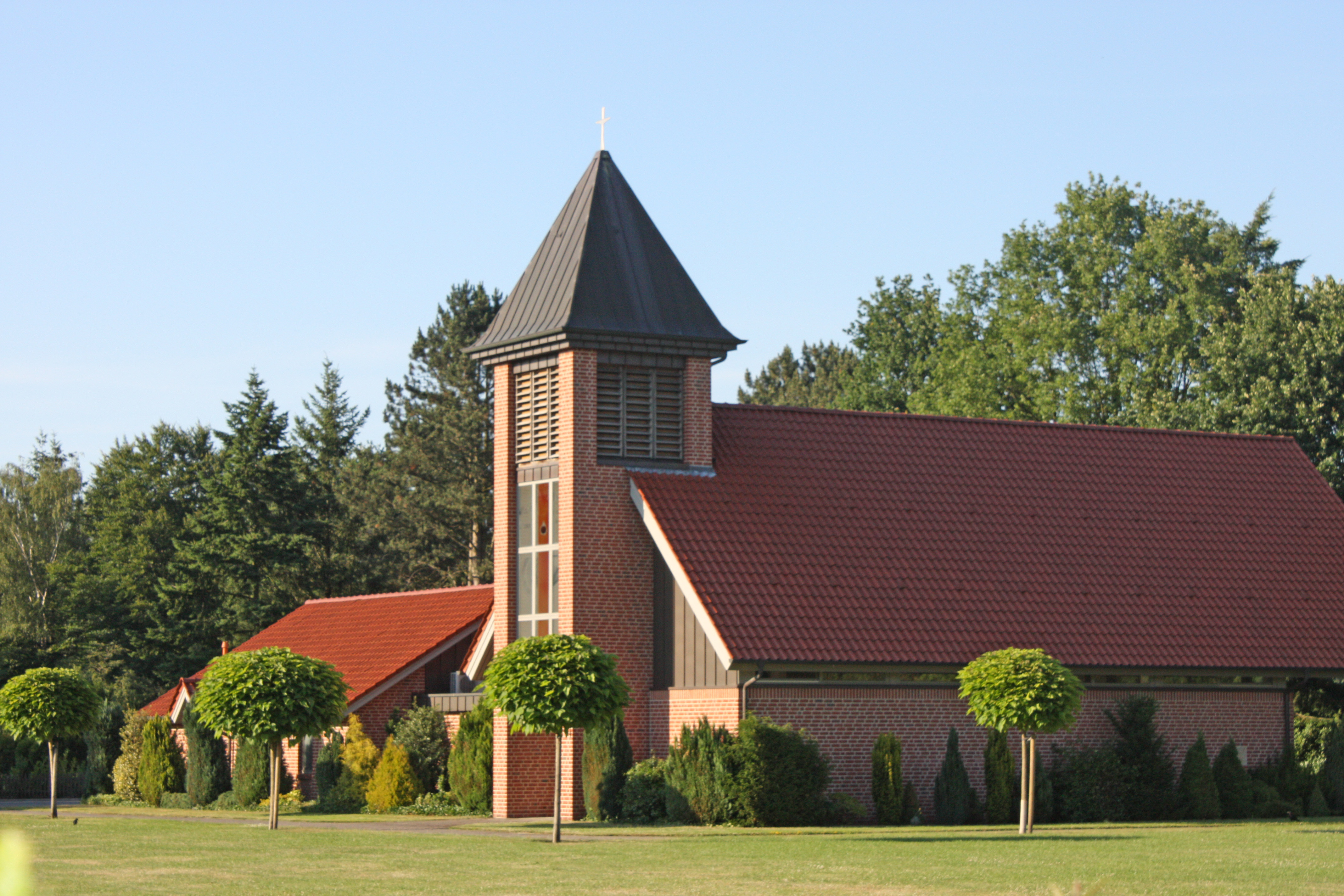 Auferstehungskapelle der evangelischen Kirchengemeinde Ladbergen. Sie gehört zum Friedhof am Rott.